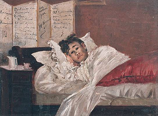 Arthur Rimbaud, ferito da Verlaine, convalescente in una pensione di Bruxelles, luglio 1873